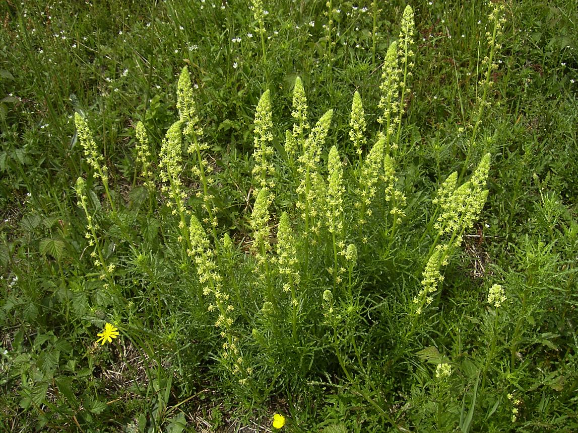 Reseda lutea Gouda, bedrijventerrein GoudsePoort, mei 2004